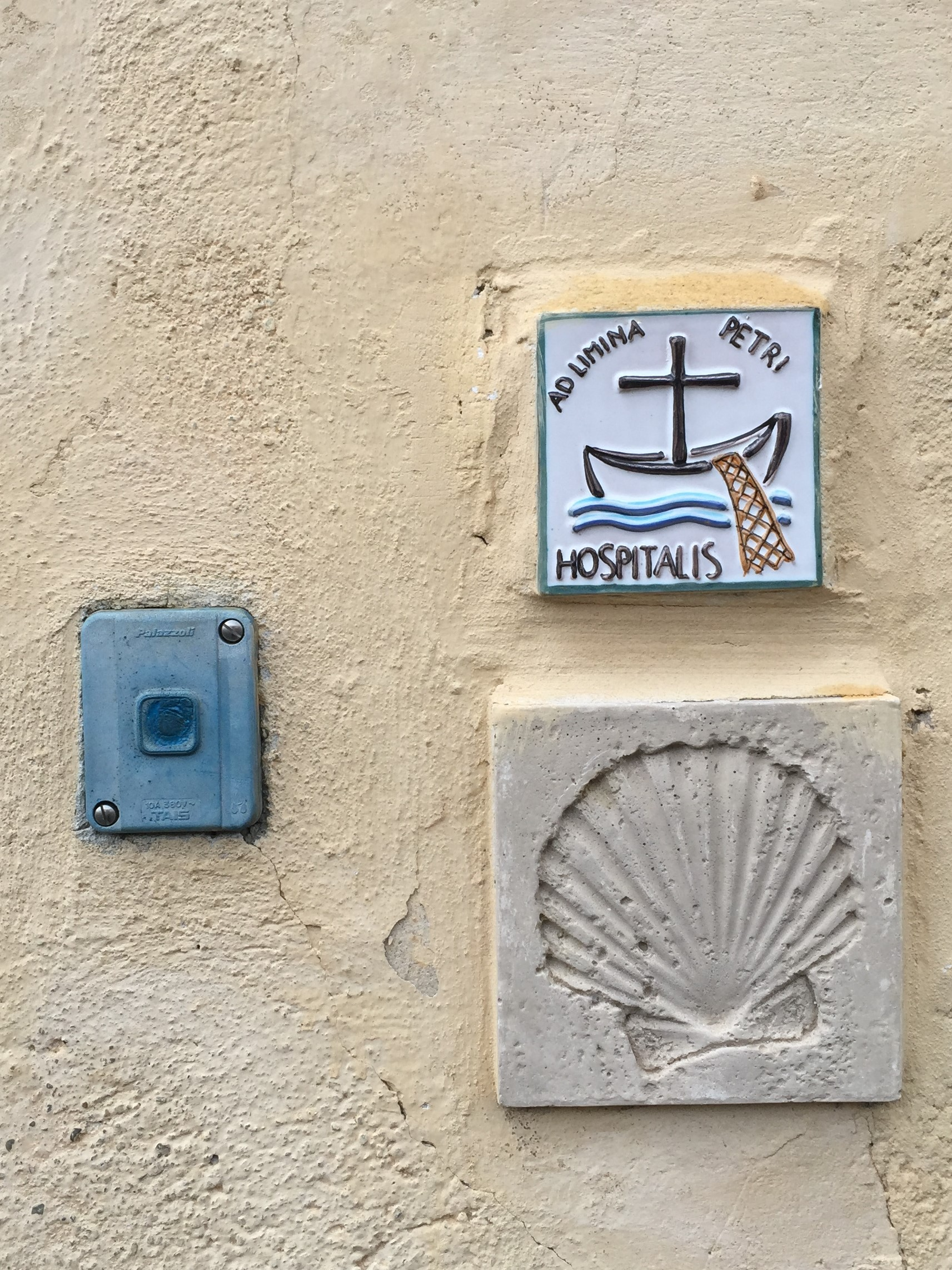 Doble símbolo (jacobeo-romeo) en el albergue de Ponte d'Arbia